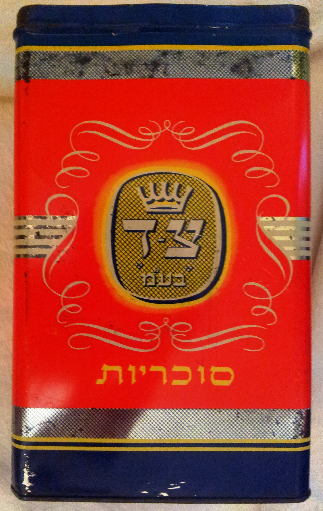 קופסת פח וצבע לסוכריות של חברת צ ד, יוצרה בשראל במחצית המאה ה-20. פאות: 26, 16, 11 ס"מ